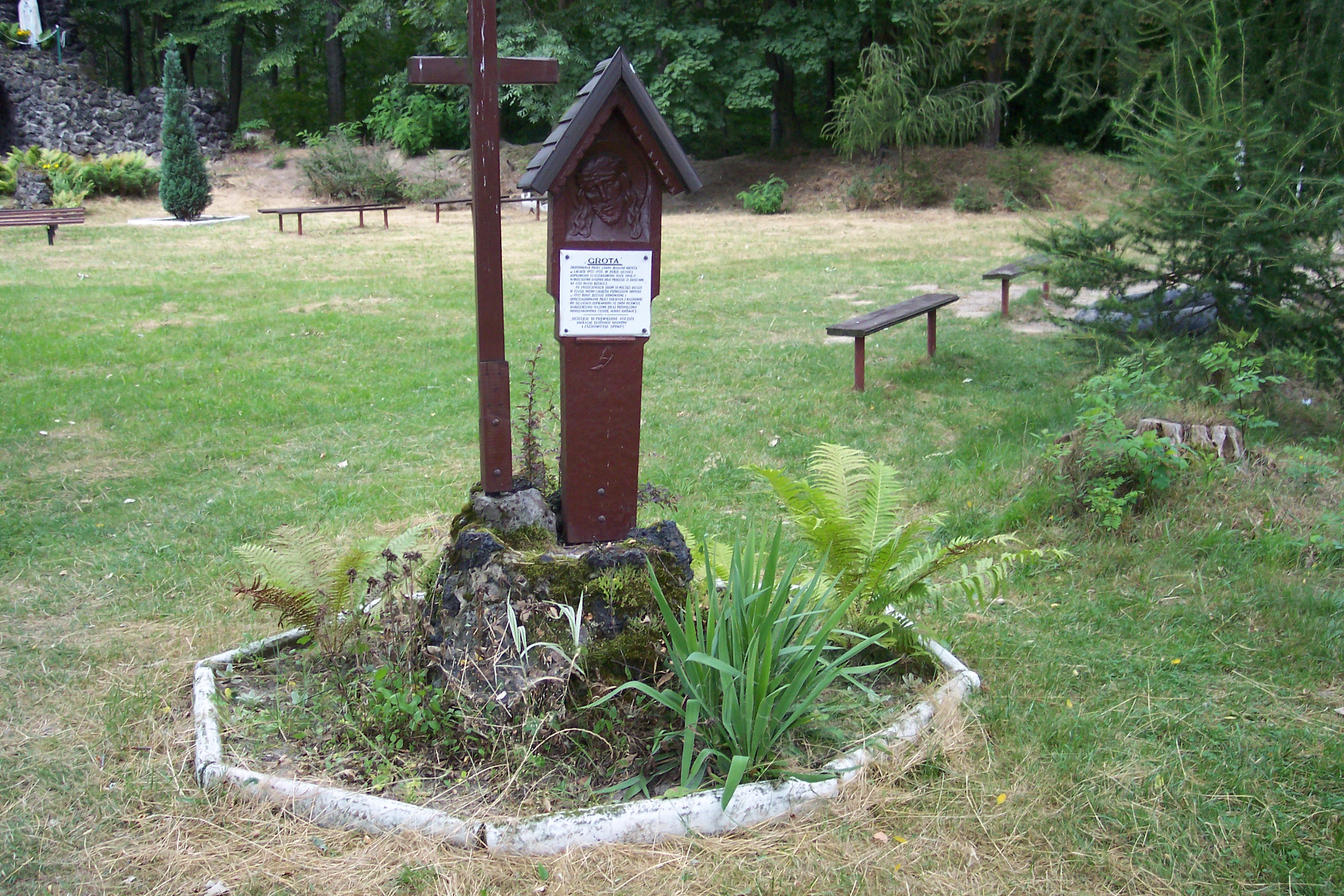 Grota w Rachowicach